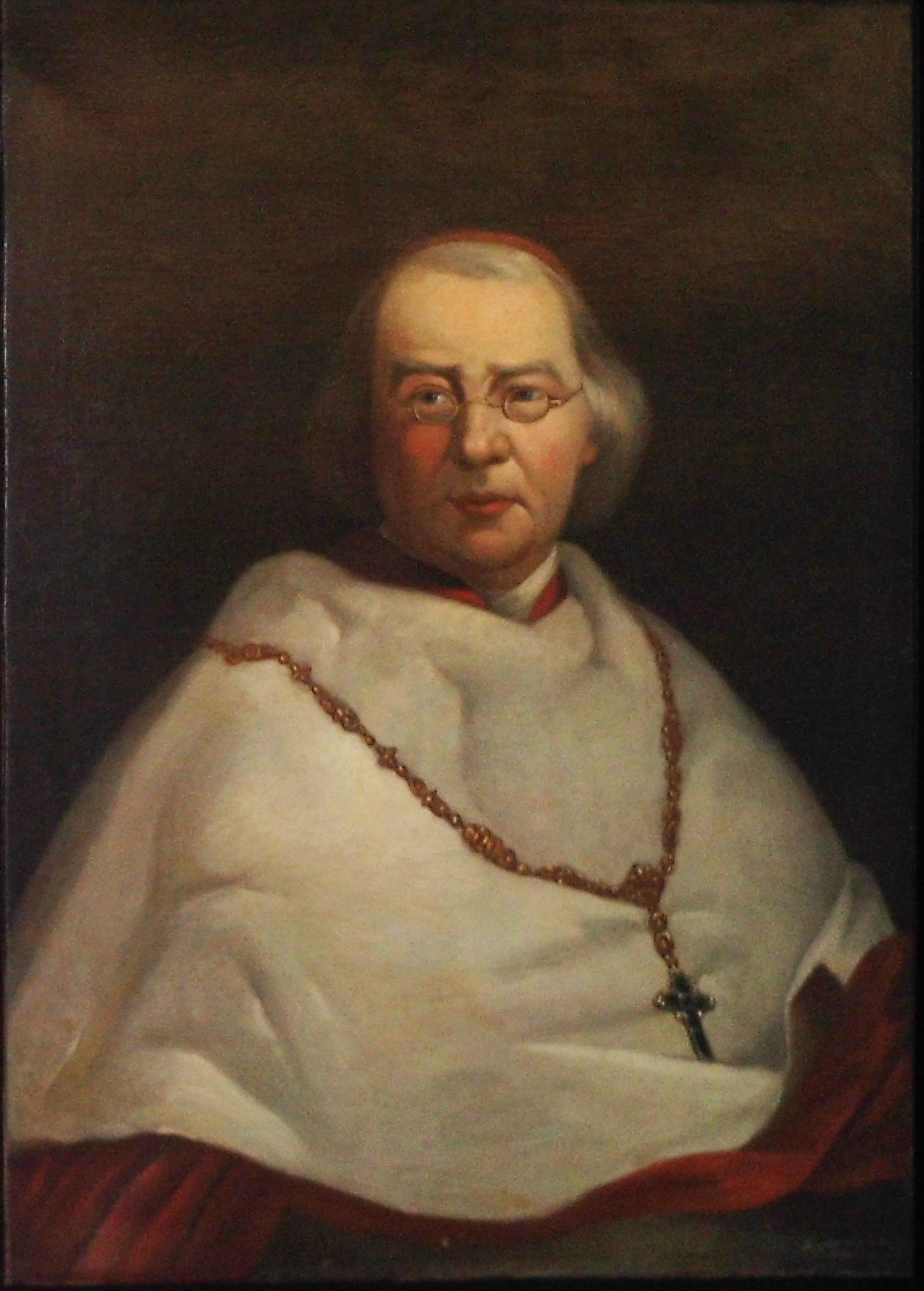 Retrato del cardenal Wiseman